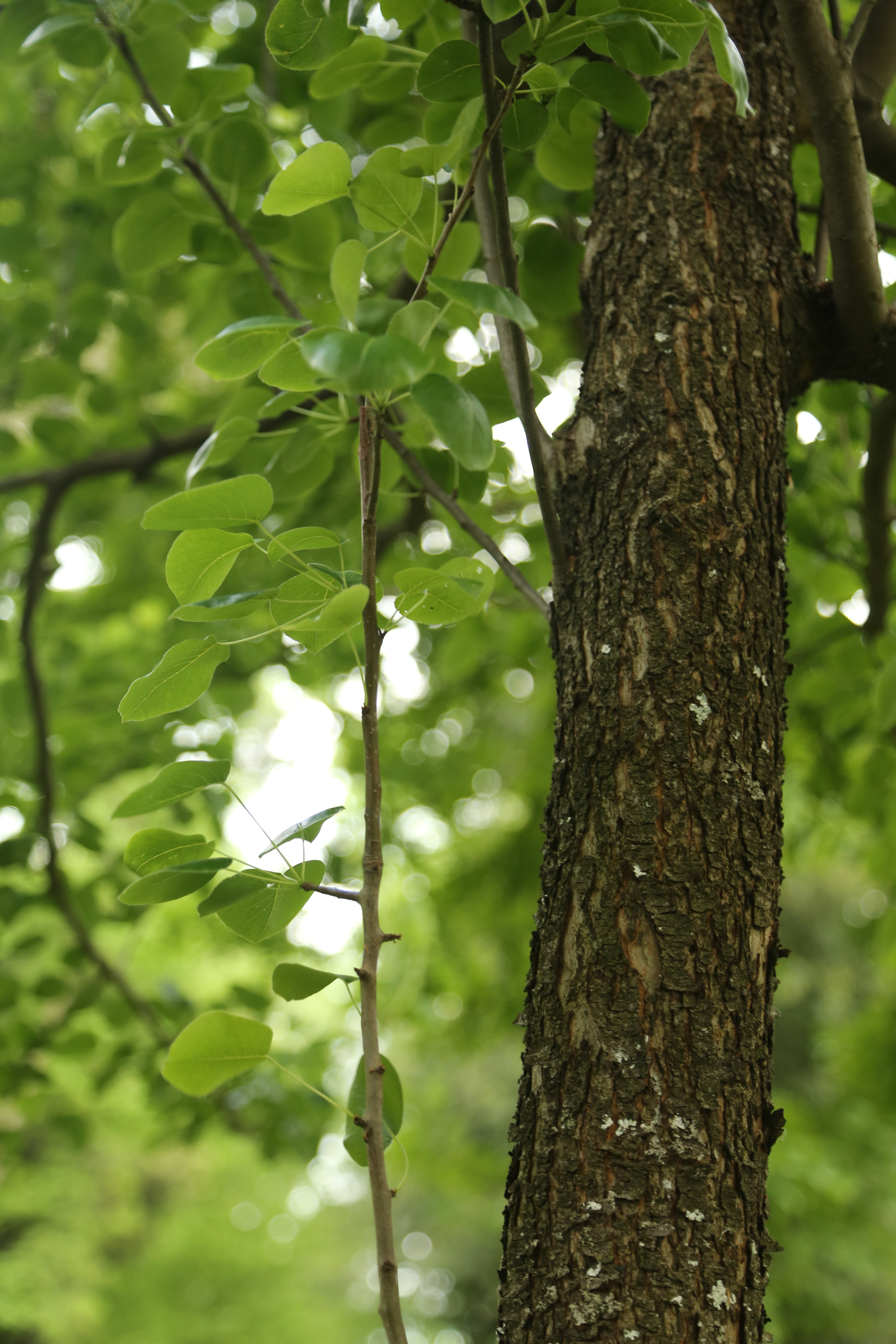 Pyrus pyraster foglie e tronco